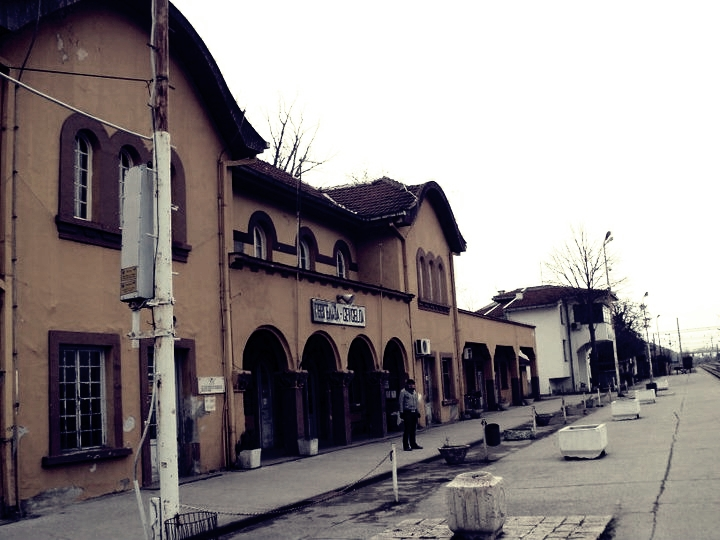 Гевгелија, Македонија